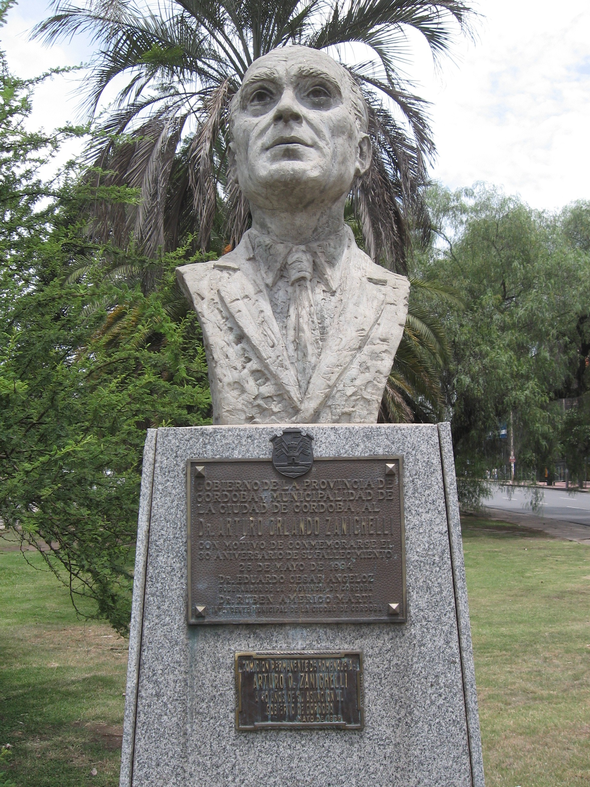 Busto del gobernador cordobés Arturo Zanichelli, en la plazoleta que lleva su nombre.